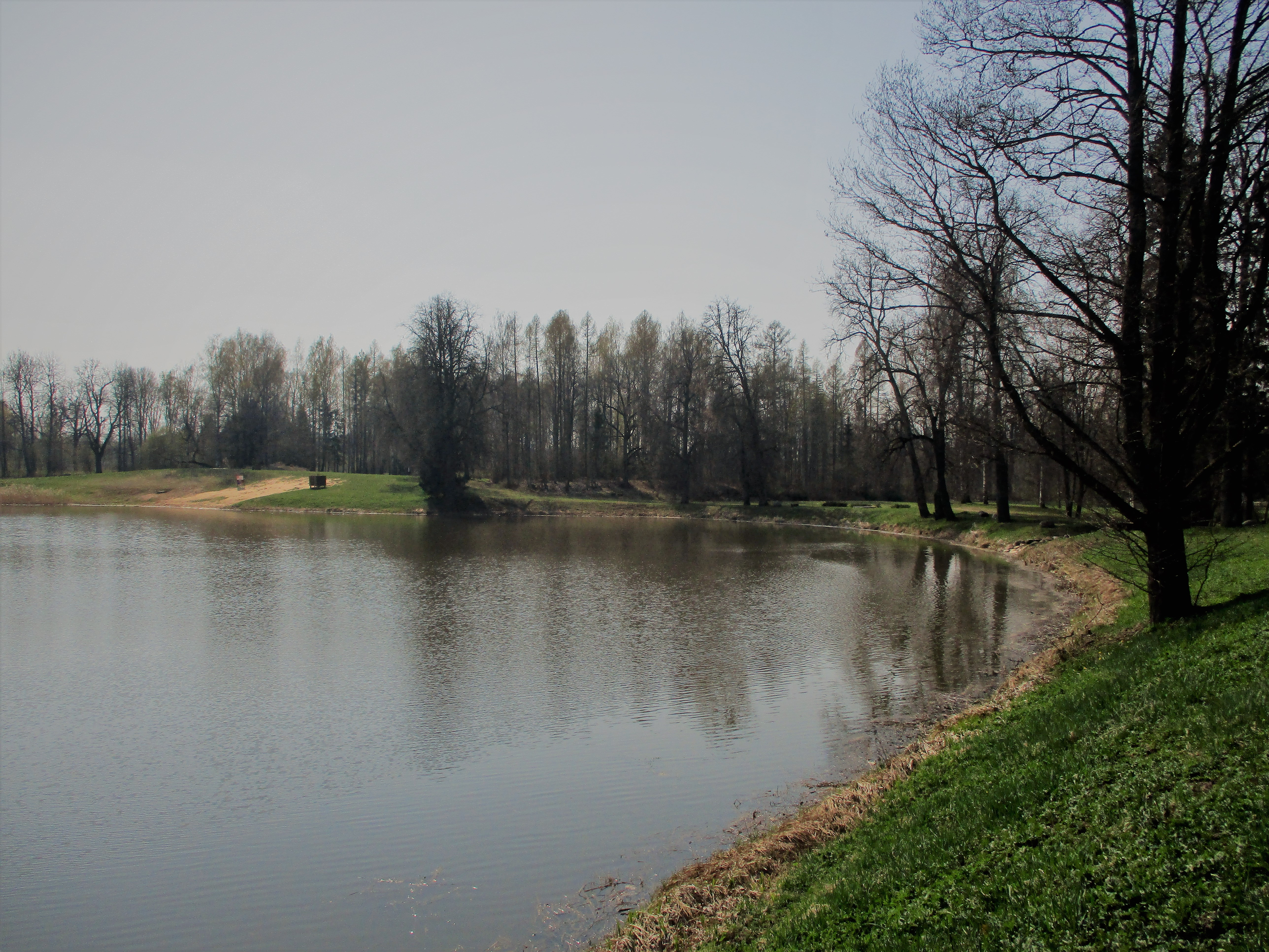 Vaade kirdest, järve põhjakaldalt Mõniste vasallilinnuse asukoha suunas.